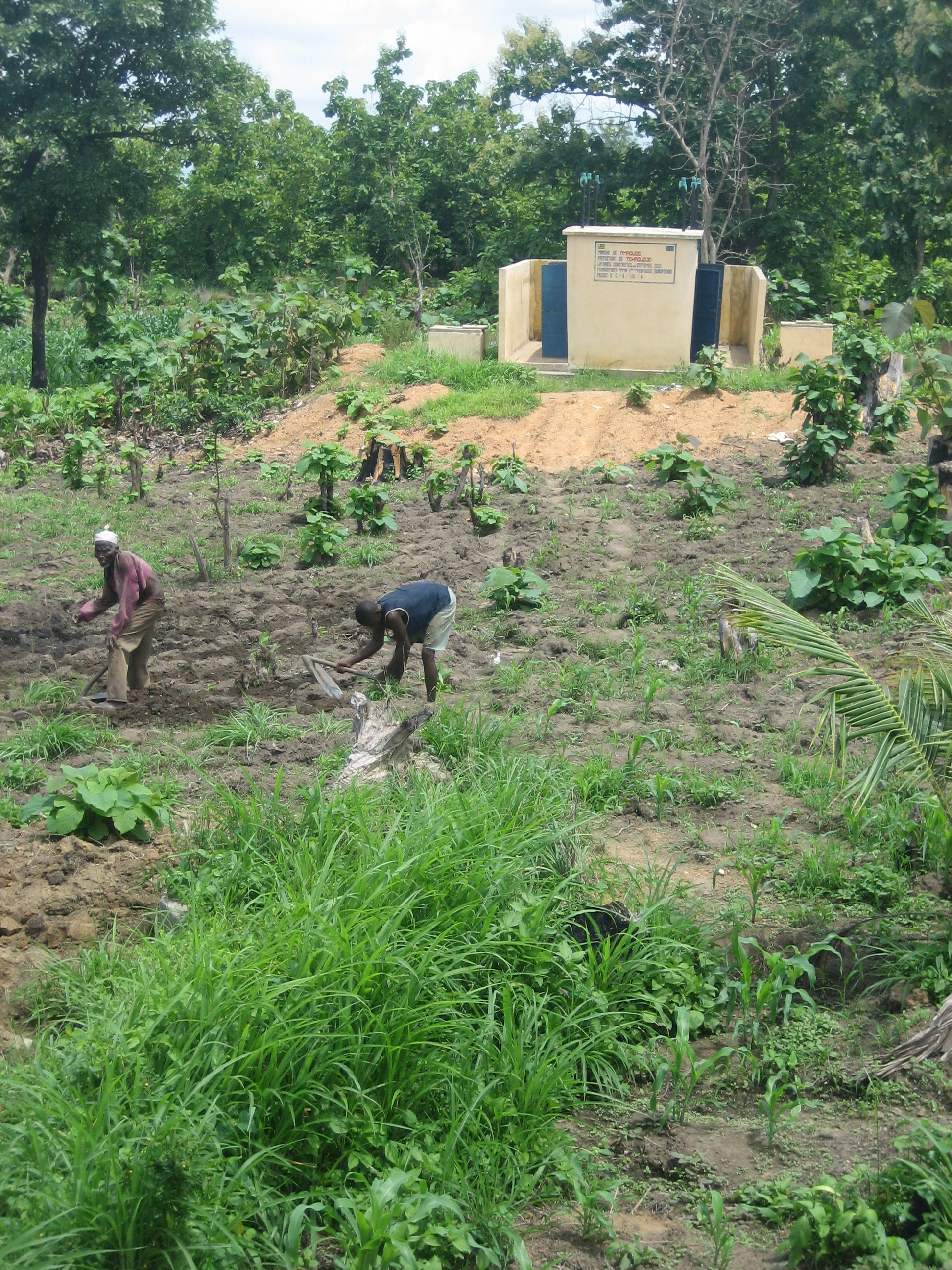 Agriculture au Togo